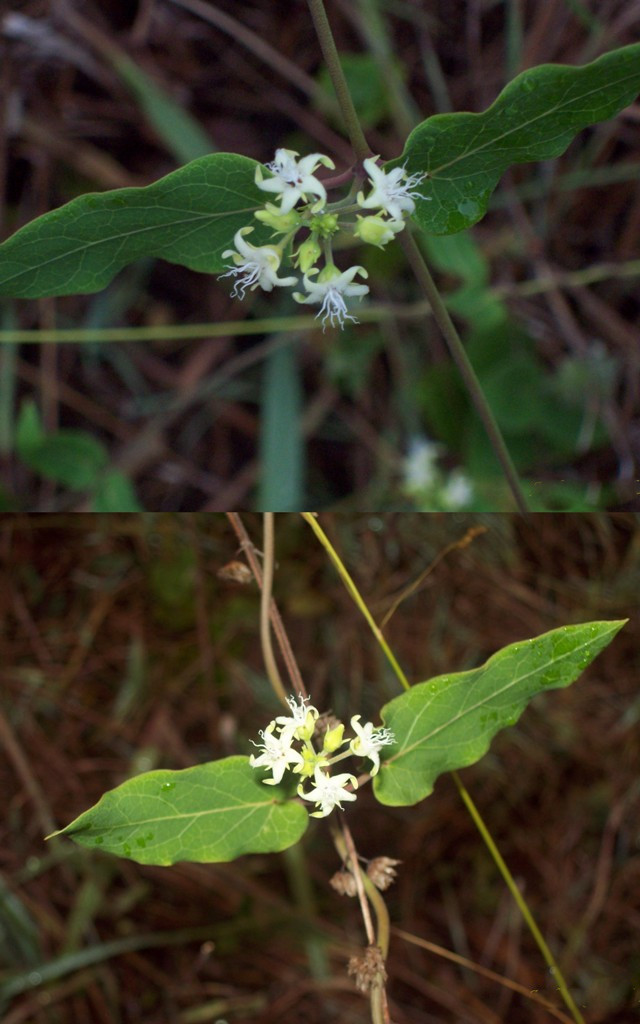 Schistogyne sylvestris. Apocynaceae. Fotos tomadas entre arbustos al margen de la Ruta 30 en Bajada de Pena y en pajonal al margen de la Cañada del Sauce, departamento de Rivera, Uruguay.